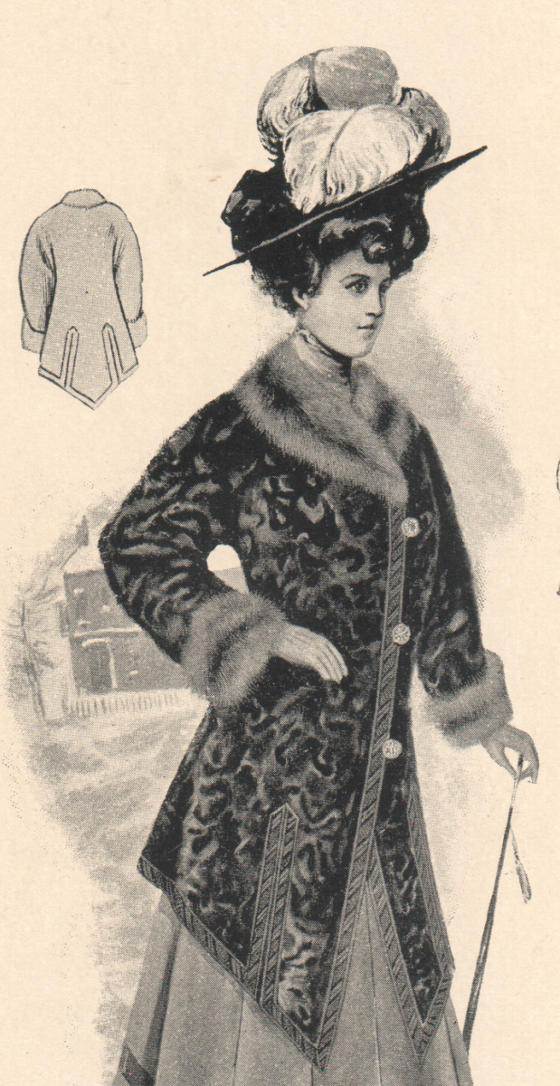 Modebilder 1908/1909 :Nr. 10. Astrachan-Jackett mit Zobelbesatz. Von Fr. März, Leipzig. :Nr. 11. Persianer-Jackett. Von C. A. Herpich Söhne, Berlin.